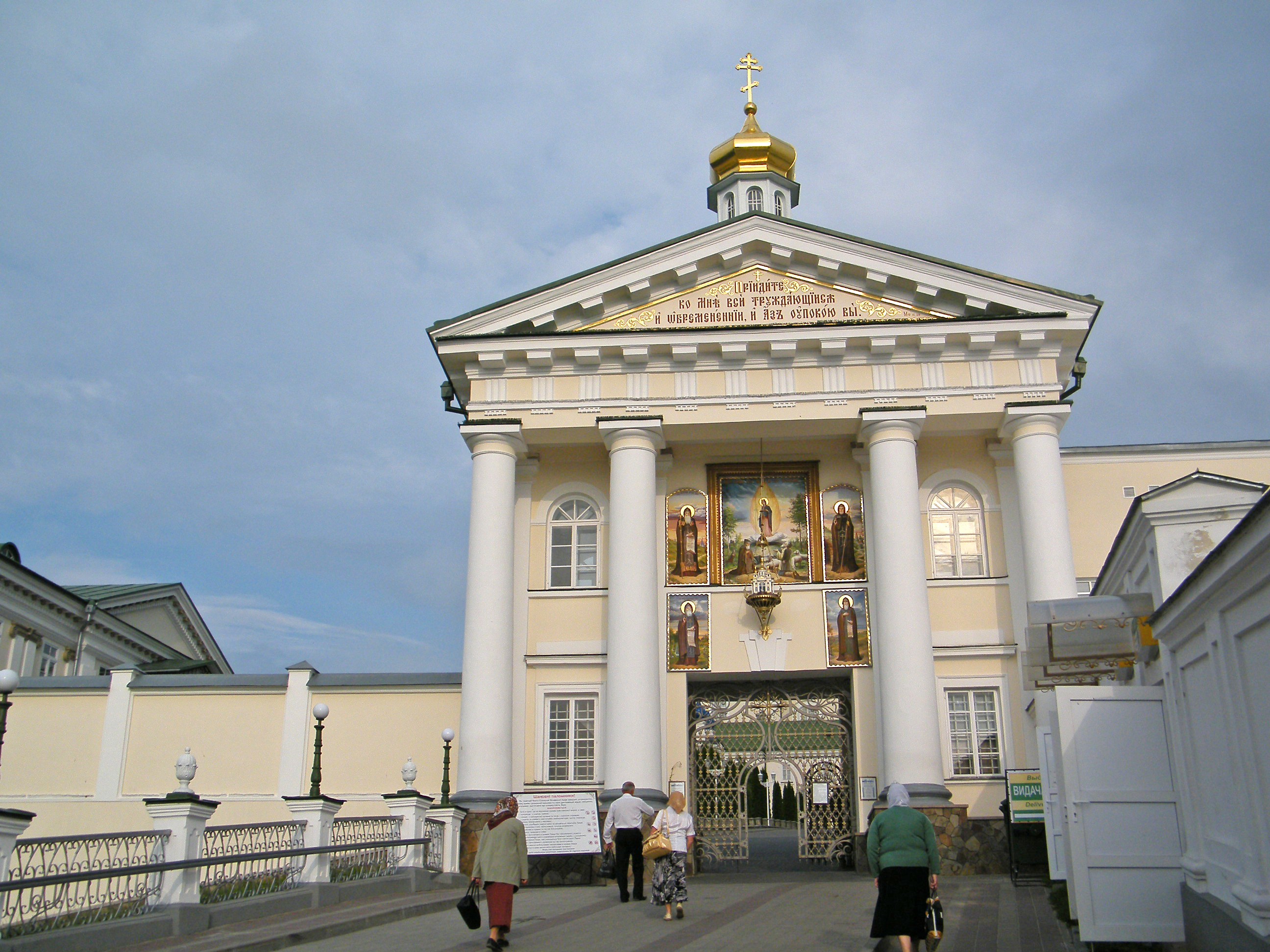 Вход в лавру